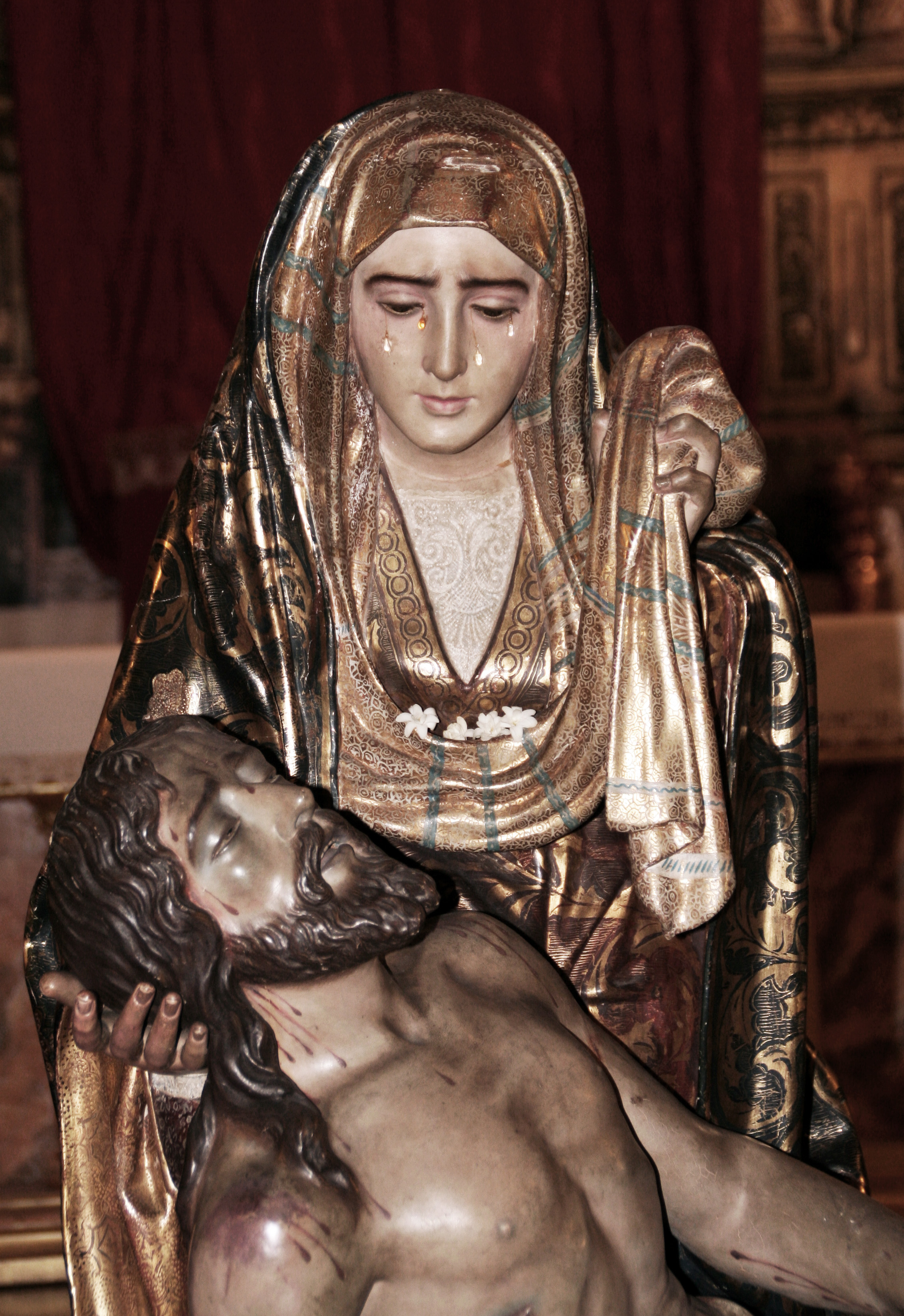 Virgen de las Angustias, patrona de Ayamonte (Huelva, España). (Nuestra Señora de las Angustias).